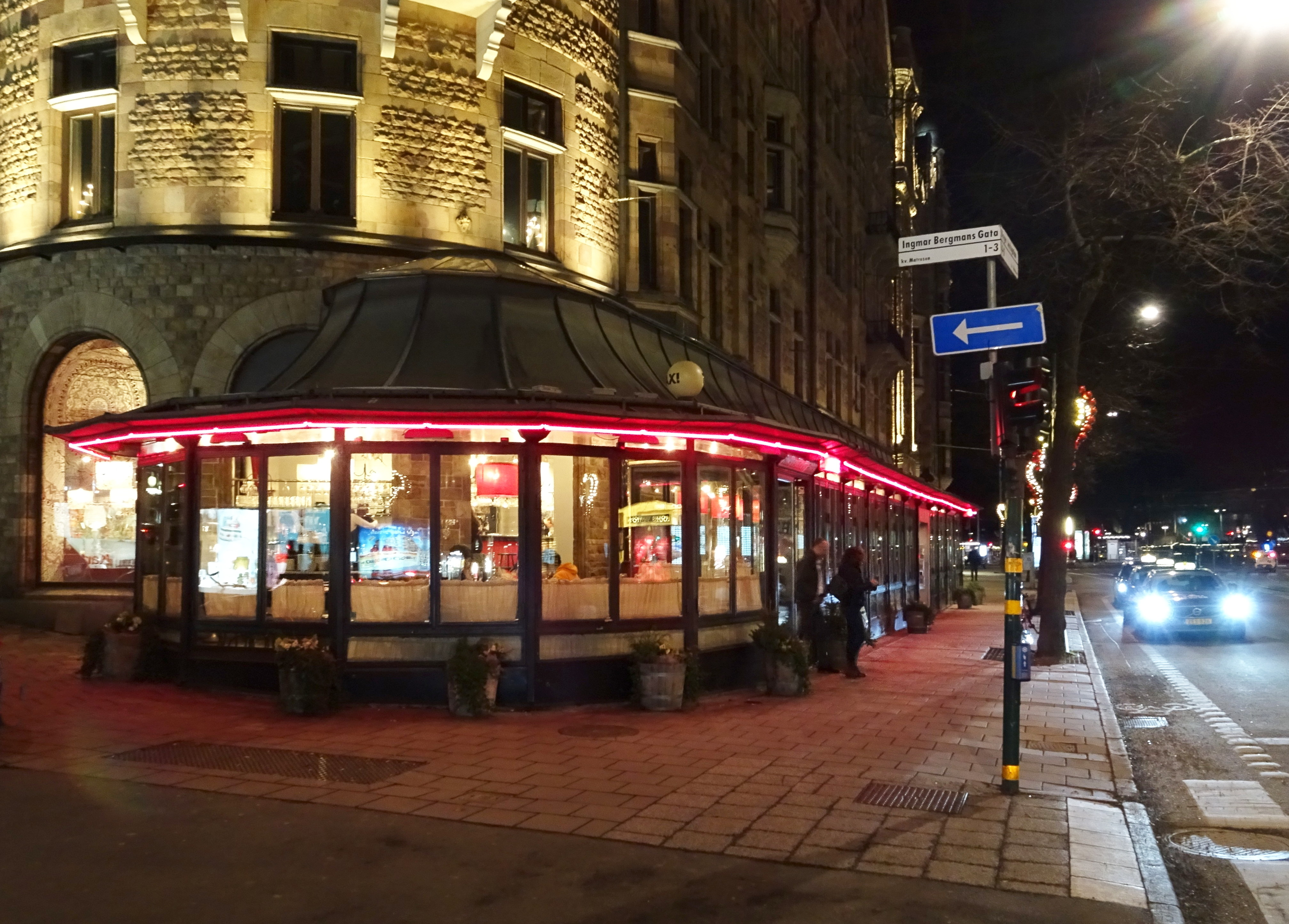 Restaurant Riche, Birger Jarlsgatan, Stockholm